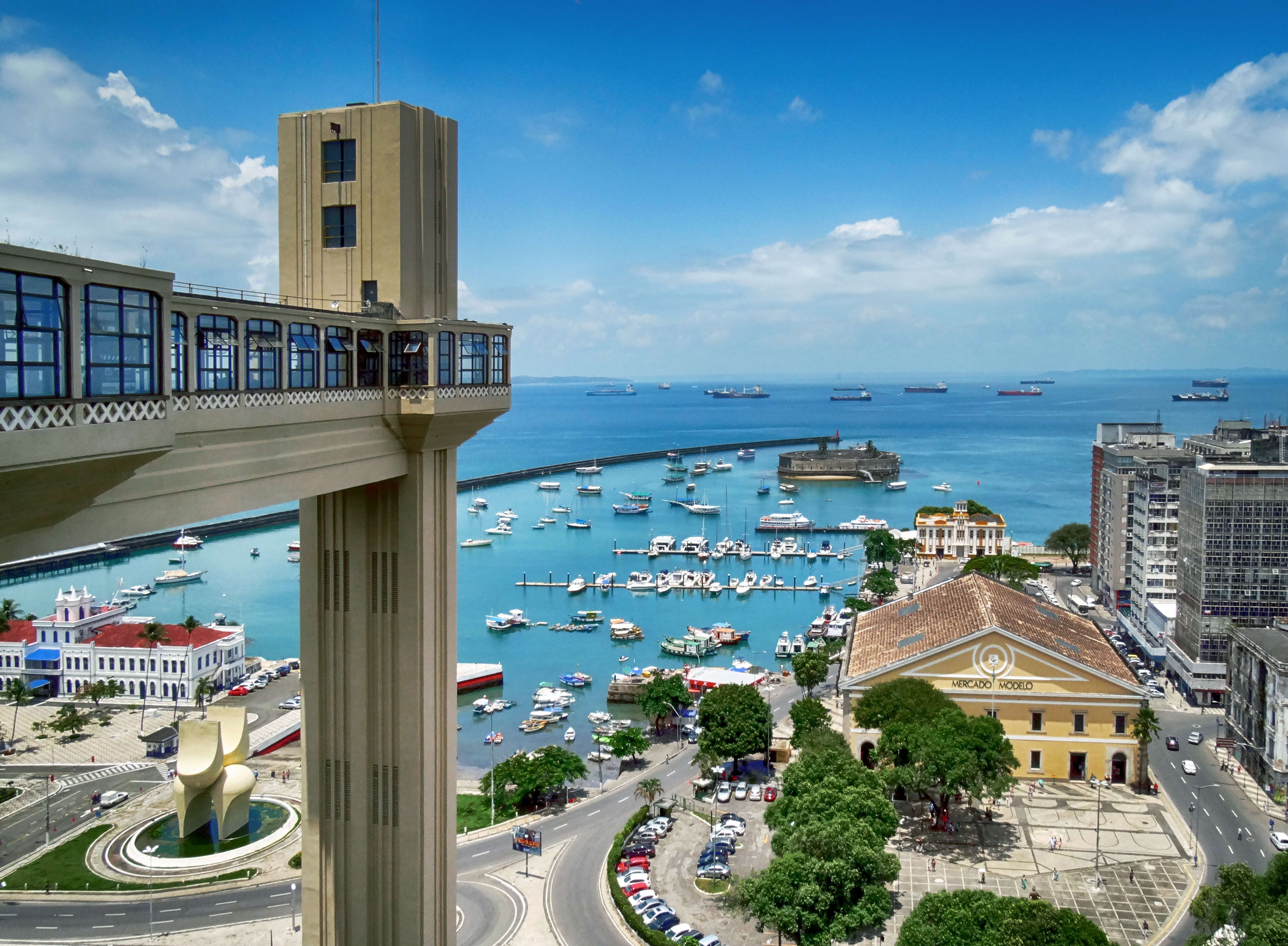 A maneira mais original de circular entre a Cidade Alta e a Cidade Baixa é através do Elevador Lacerda, um dos marcos da capital baiana inaugurado em 1872. Com 72 metros de altura, liga a Praça Tomé de Souza (parte alta) à Praça Cairu, onde fica o Mercado Modelo. Restaurado em 2002, ganhou nova iluminação noturna e janelas panorâmicas que descortinam o cais e o mercado. São quatro cabines, sendo que a 1 e a 2 são originais, utilizadas desde a inauguração. As de número 3 e 4 são da obra de 1930. As viagens duram cerca de 30 segundos e transportam uma média de 20 mil pessoas por dia.